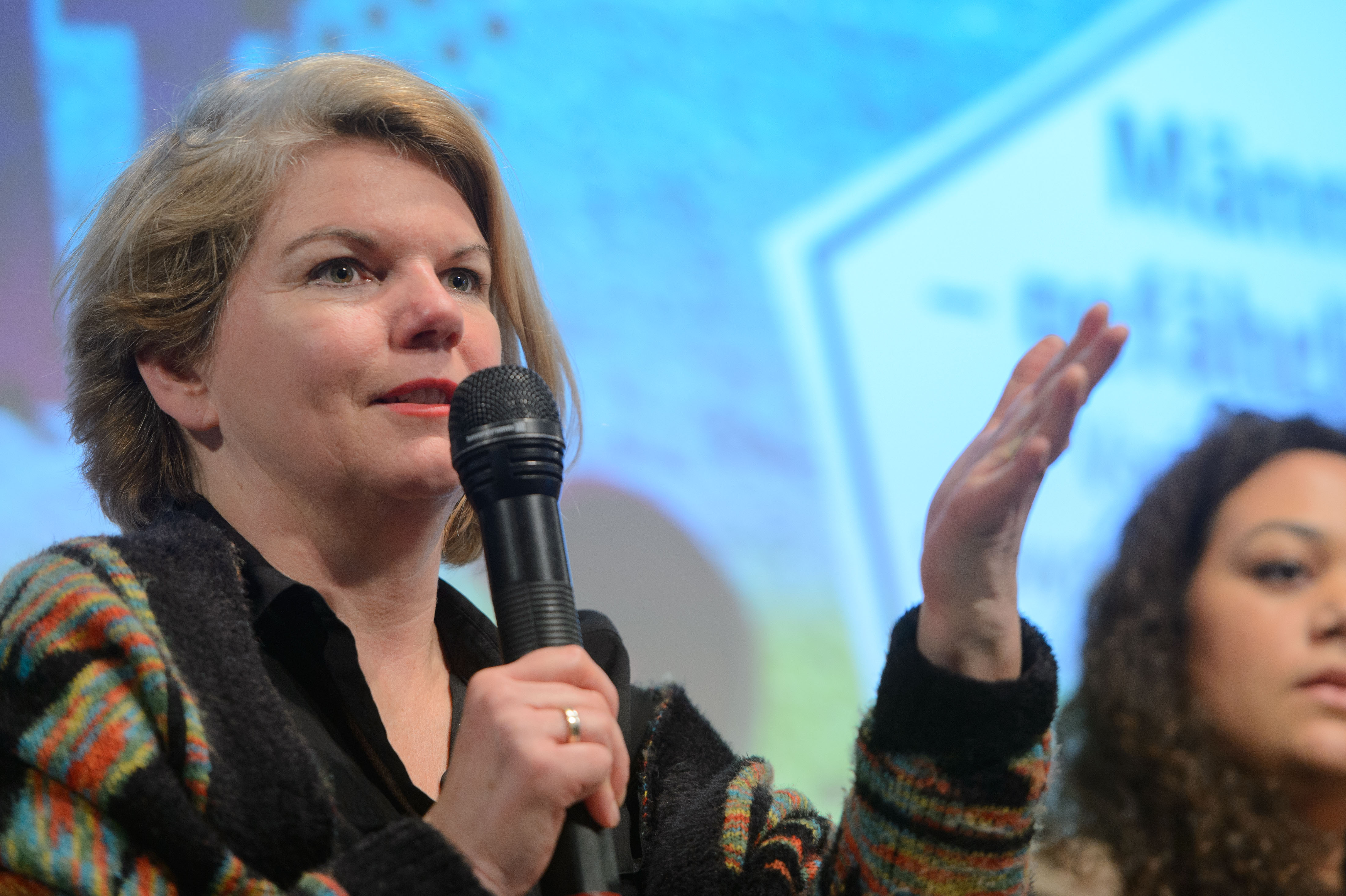 Heinrich-Böll-Stiftung: StreitWert: Von der Legende des schwarzhaarigen Täters Ines Kappert (Leitung Gunda-Werner-Institut) Foto:Stephan Röhl